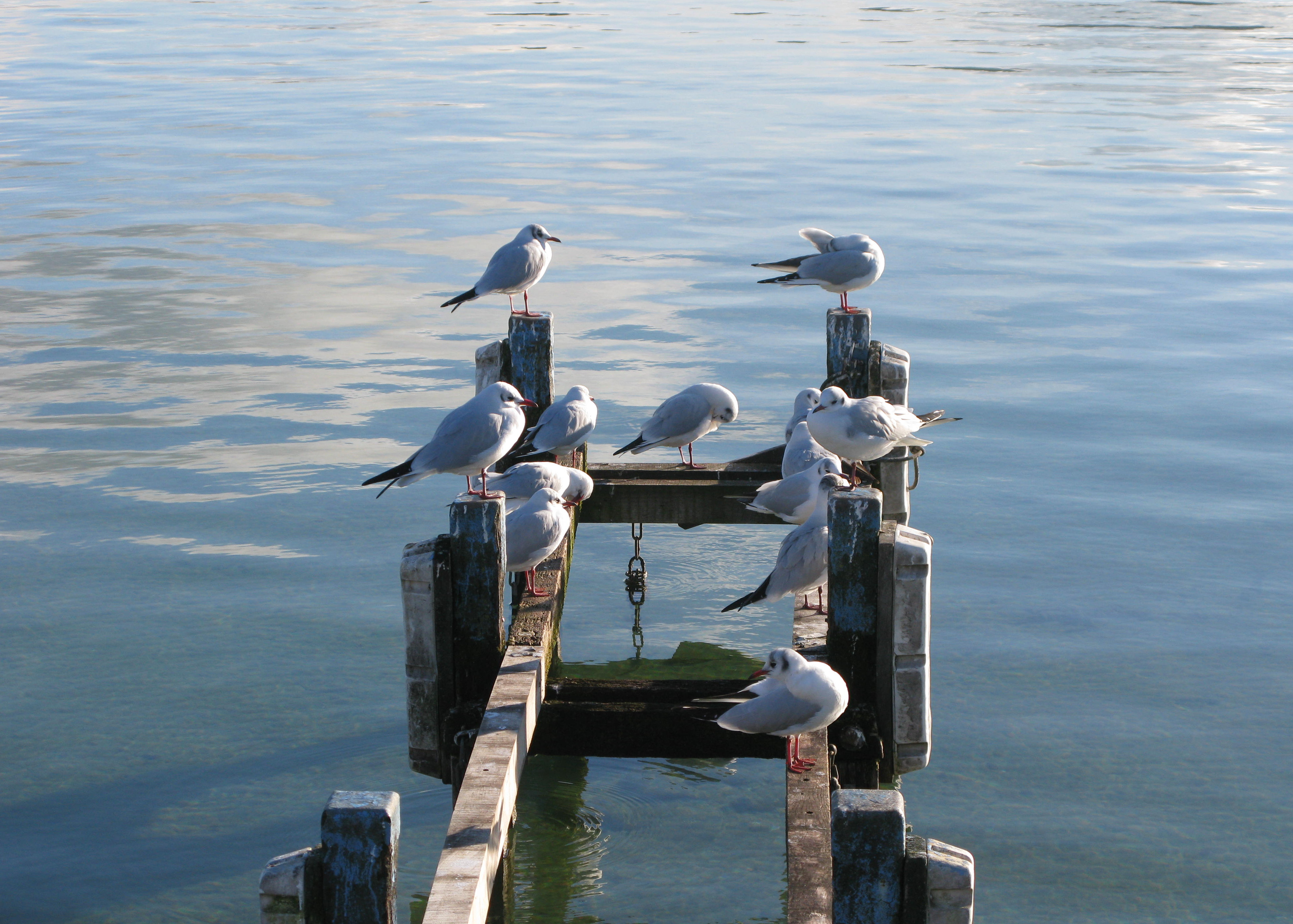 Mouettes rieuses (chroicocephalus ridibundus) au bord du lac d'Annecy, à Annecy.